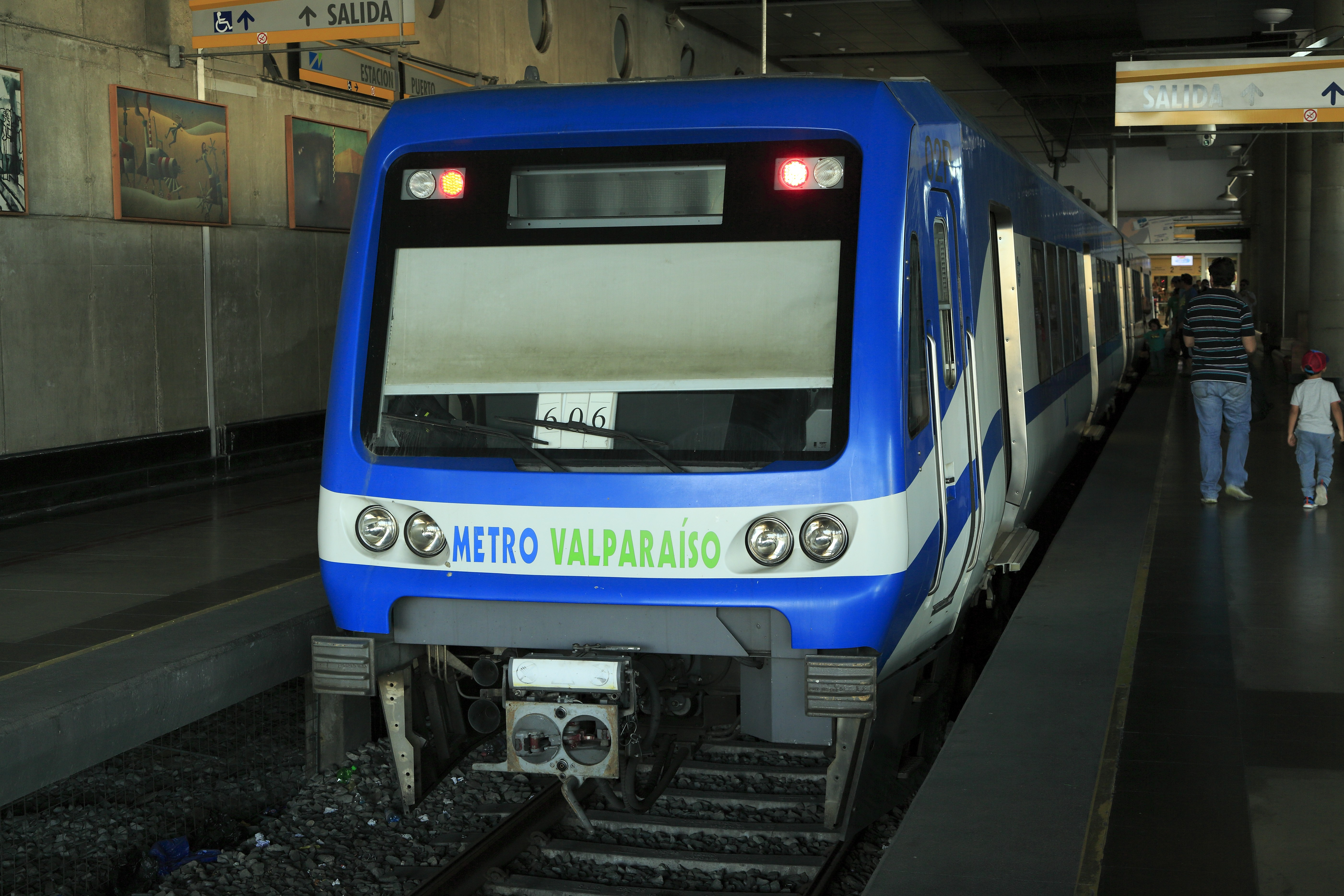 Wendehalt, Zug von und nach Limache. Wegen des hier insbesondere im Berufsverkehr starken Fahrgastaufkommens wurde für die Bahnsteiganordnung die »spanische Lösung« gewählt. Die ankommenden Reisenden verlassen die Wagen auf der jeweiligen Außenseite, die abfahrenden steigen vom Inselbahnsteig aus zu. An Sonntagen ist diese Richtungstrennung nicht notwendig.